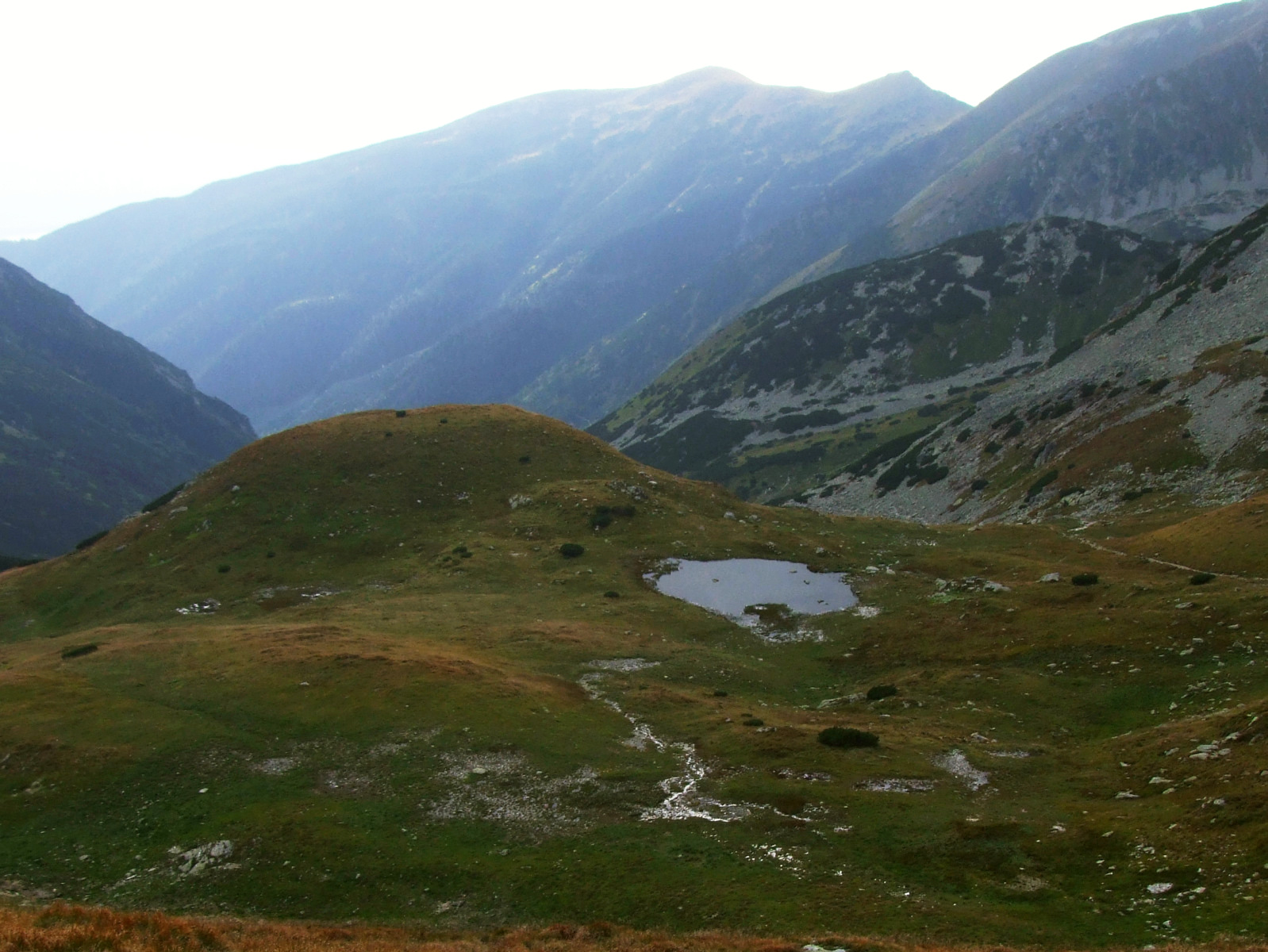 Stawek pod Żarską Przełeczą (West Tatra Mountains) Pohľad na jazierko pod Žiarskym sedlom z neho (vyskytuje sa tam mnoho svišťov). In english: View of a small pool under Žiarske sedlo from Žiarske sedlo.